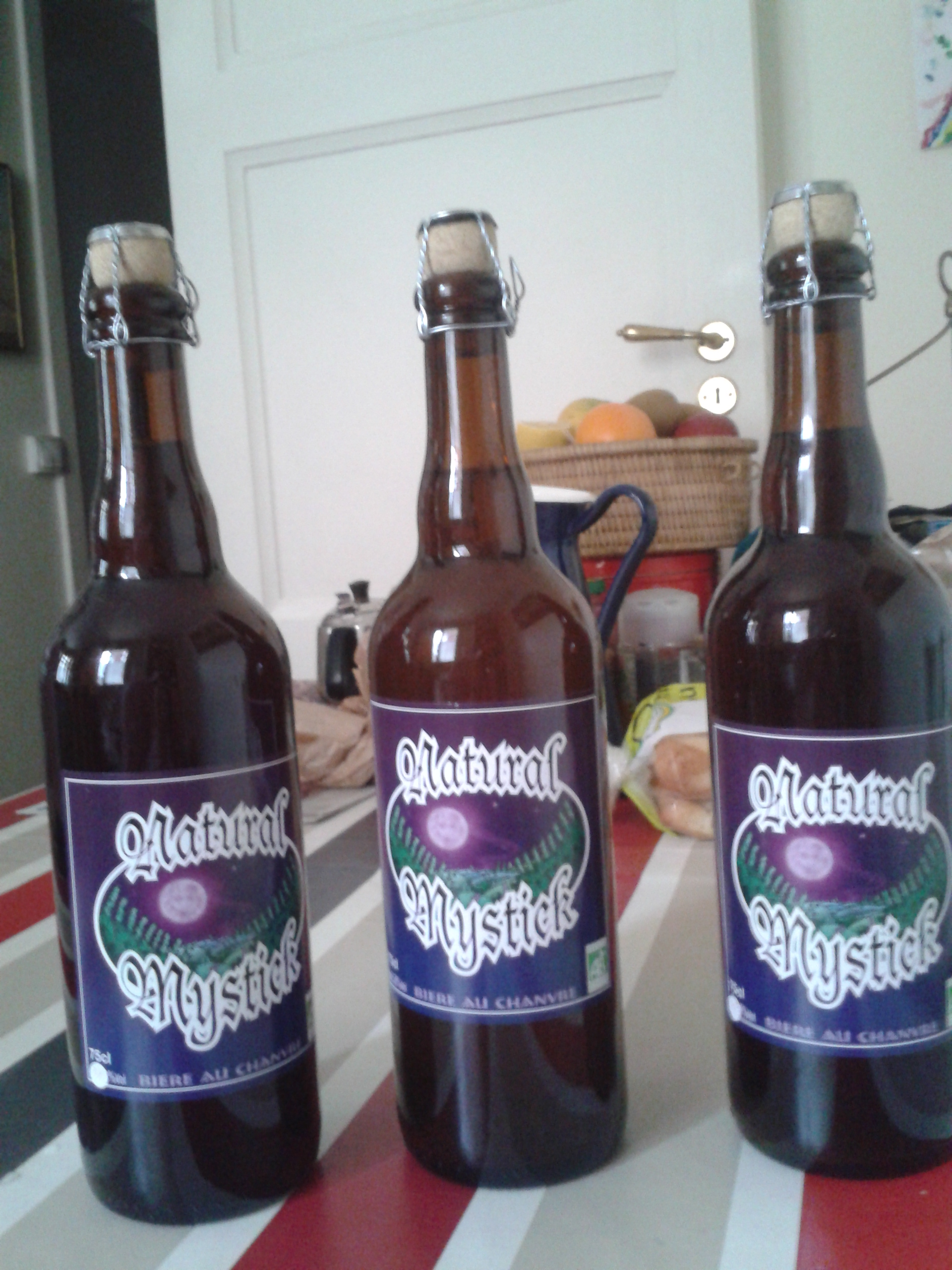 Bouteilles de bière artisanale bio "Natural Mystick"